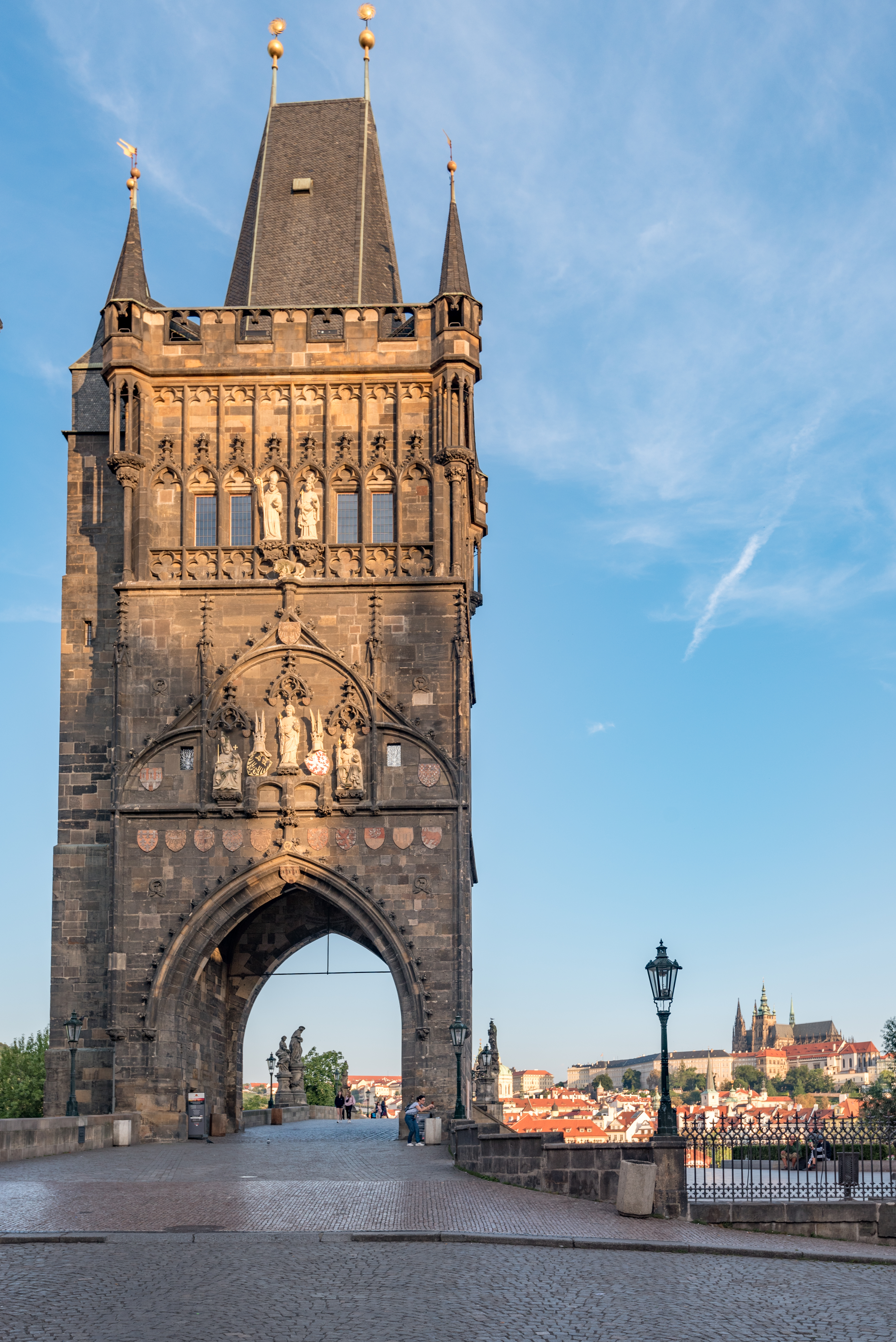 Praha 1, Karlův most